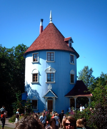 Muumide kodumaja